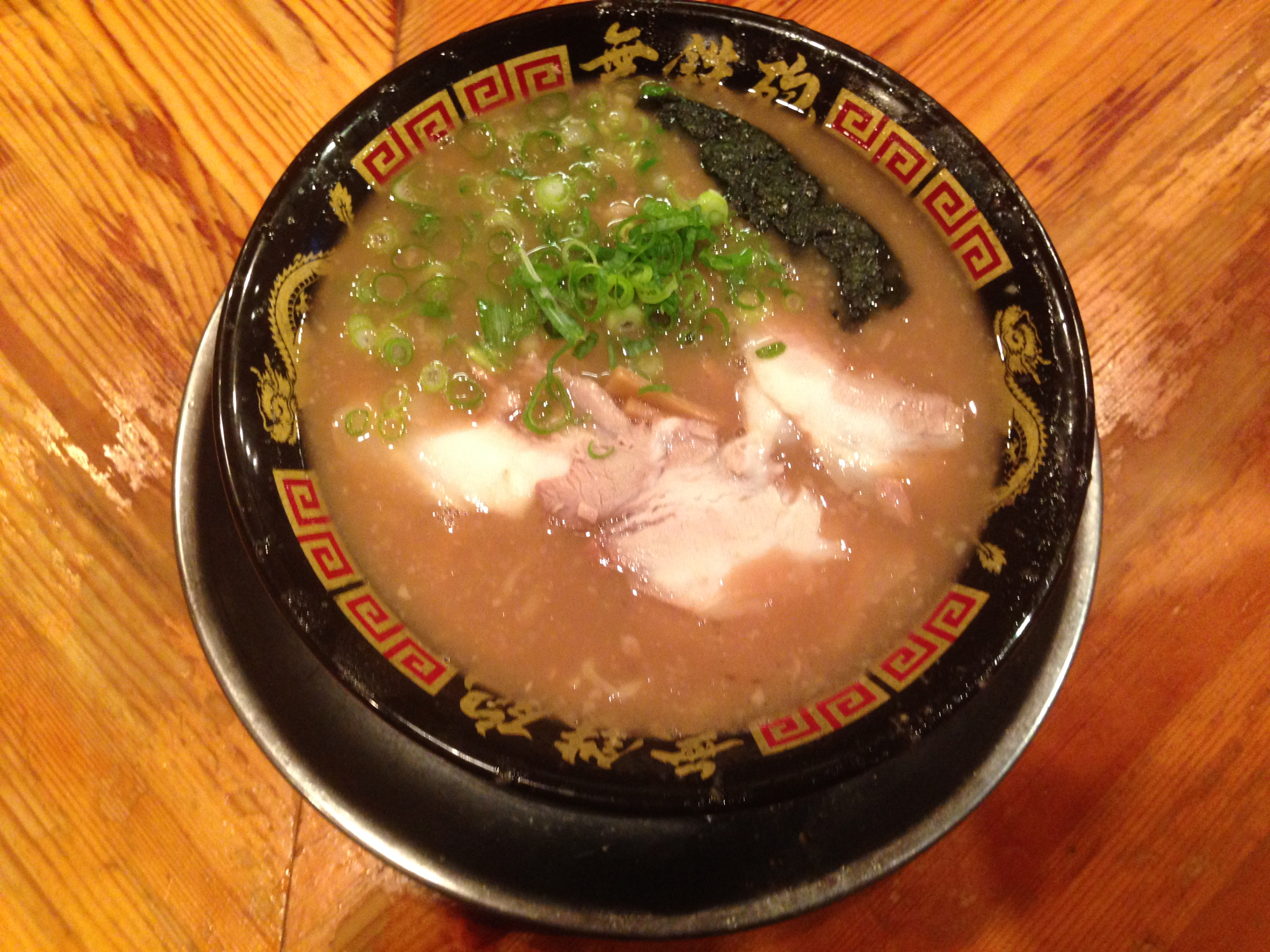 無鉄砲京都本店豚骨ラーメンノーマル。